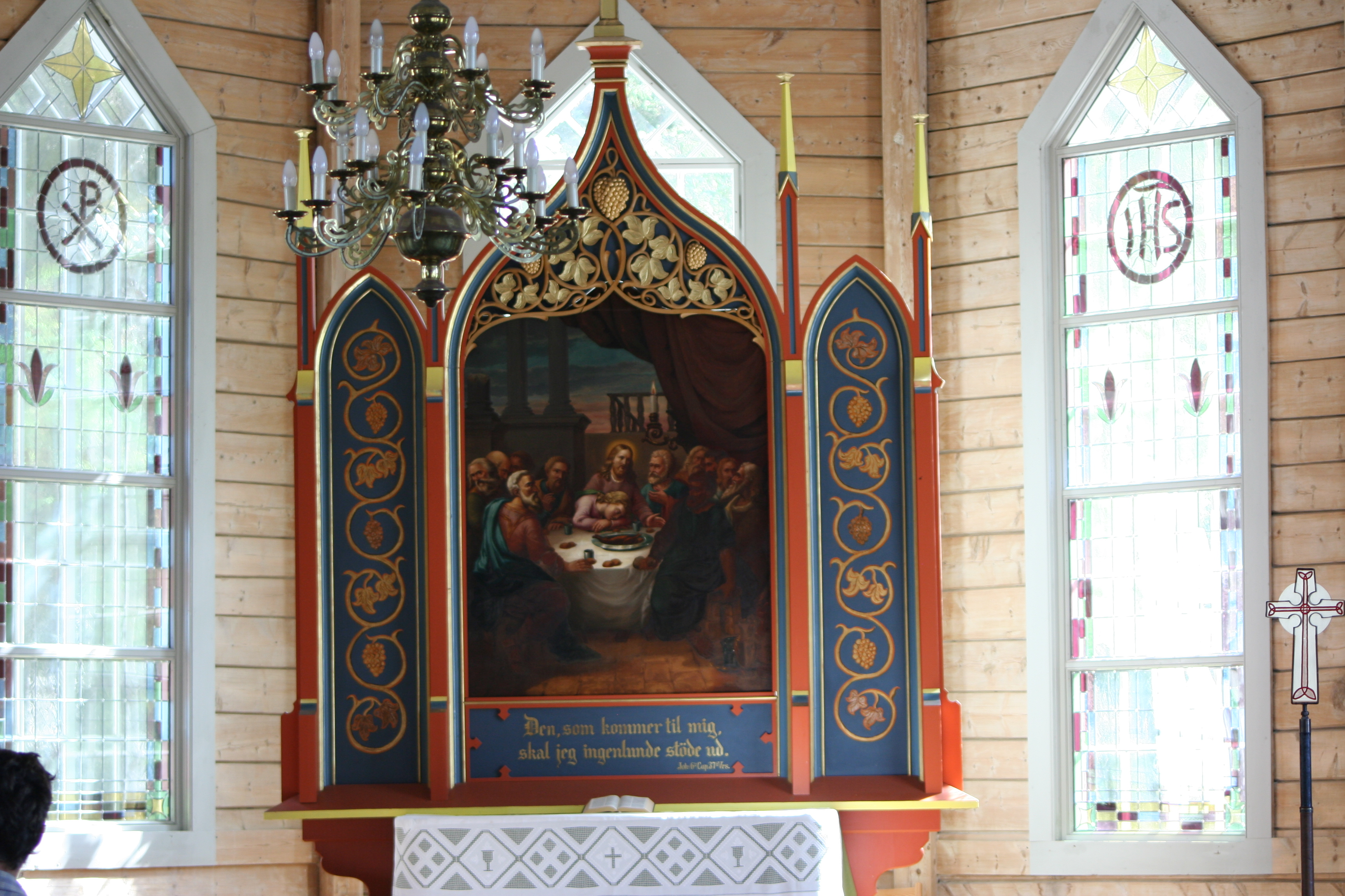 Altertavla i Selje kyrkje